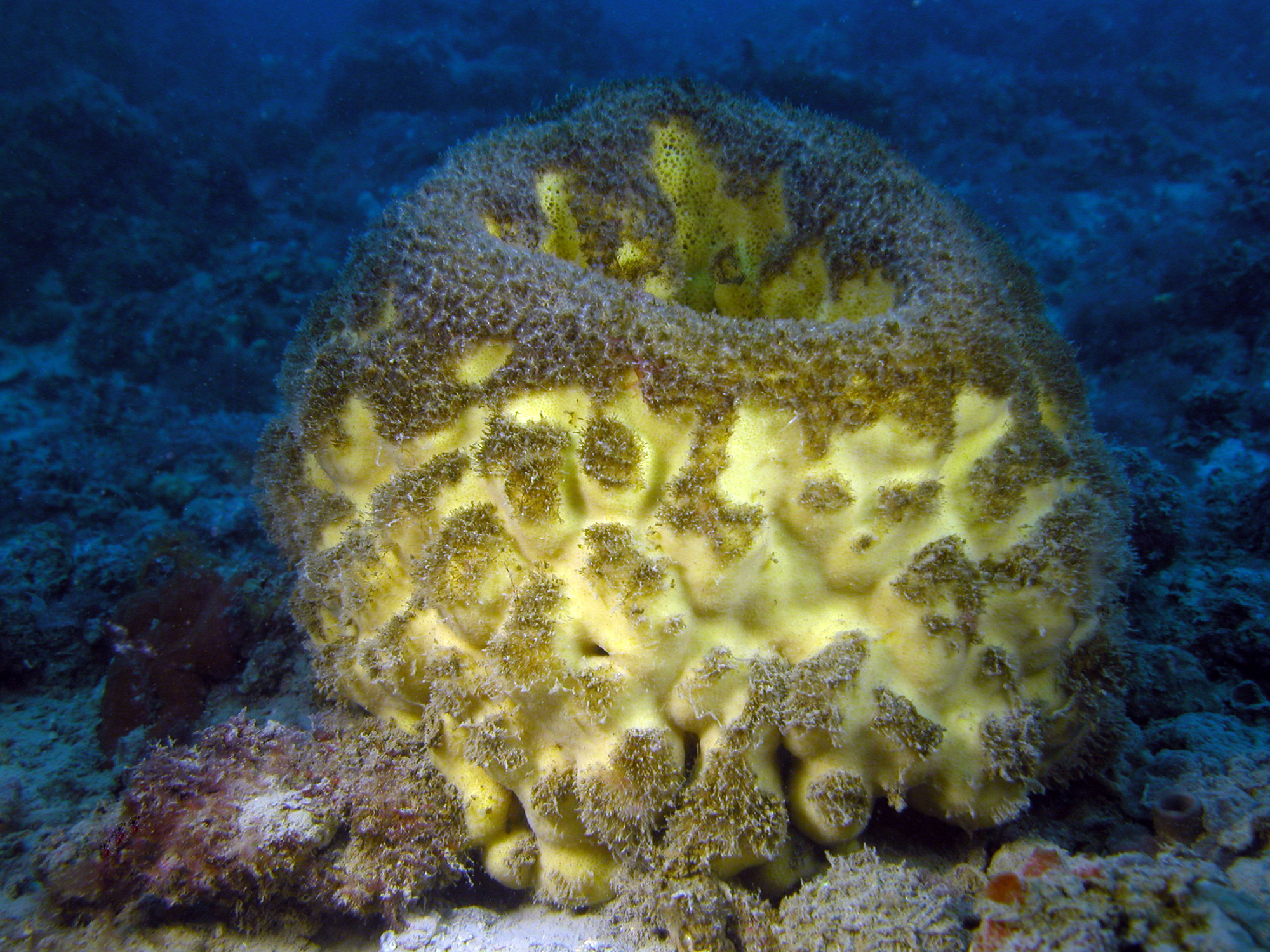 Imagen de un ejemplar de Geodia cydonium en su entorno natural.